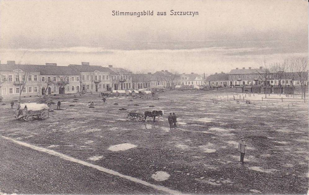 Беларуская (тарашкевіца): Шчучын (Ščučyn), пляц Рынак (plac Rynak)